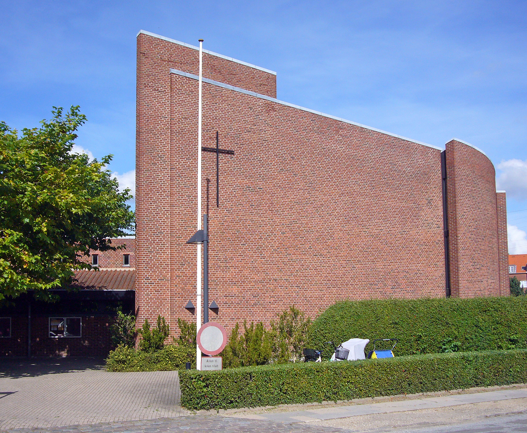 Husum Kirke, Brønshøj, Copenhagen, Denmark. Husum Kirke